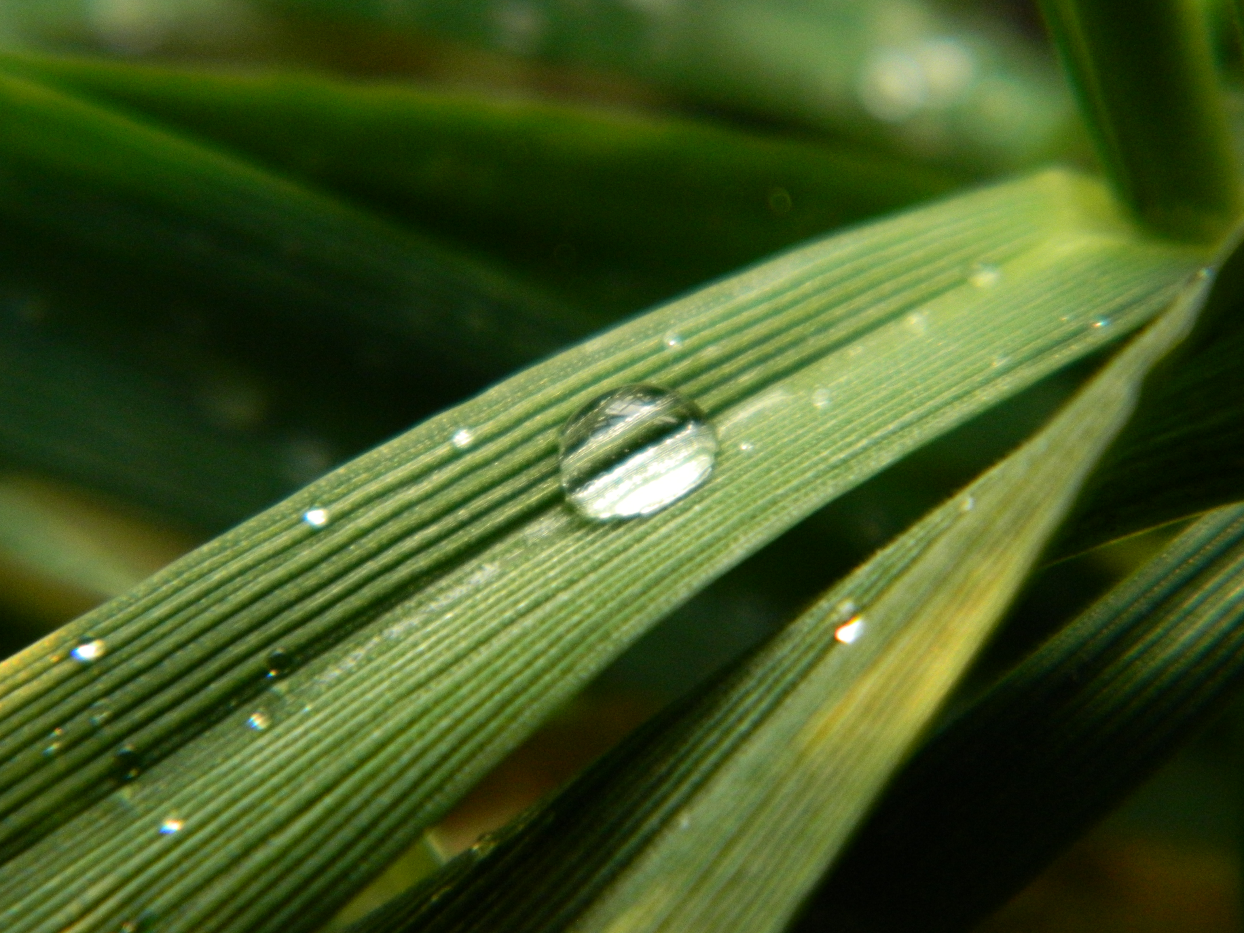 Дніпровсько-Орільський